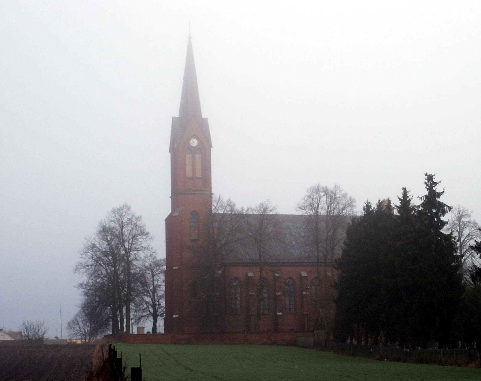 Zblewo - kościół parafialny p.w. św. Michała Archanioła (zabytek nr rejestr. A-1239)